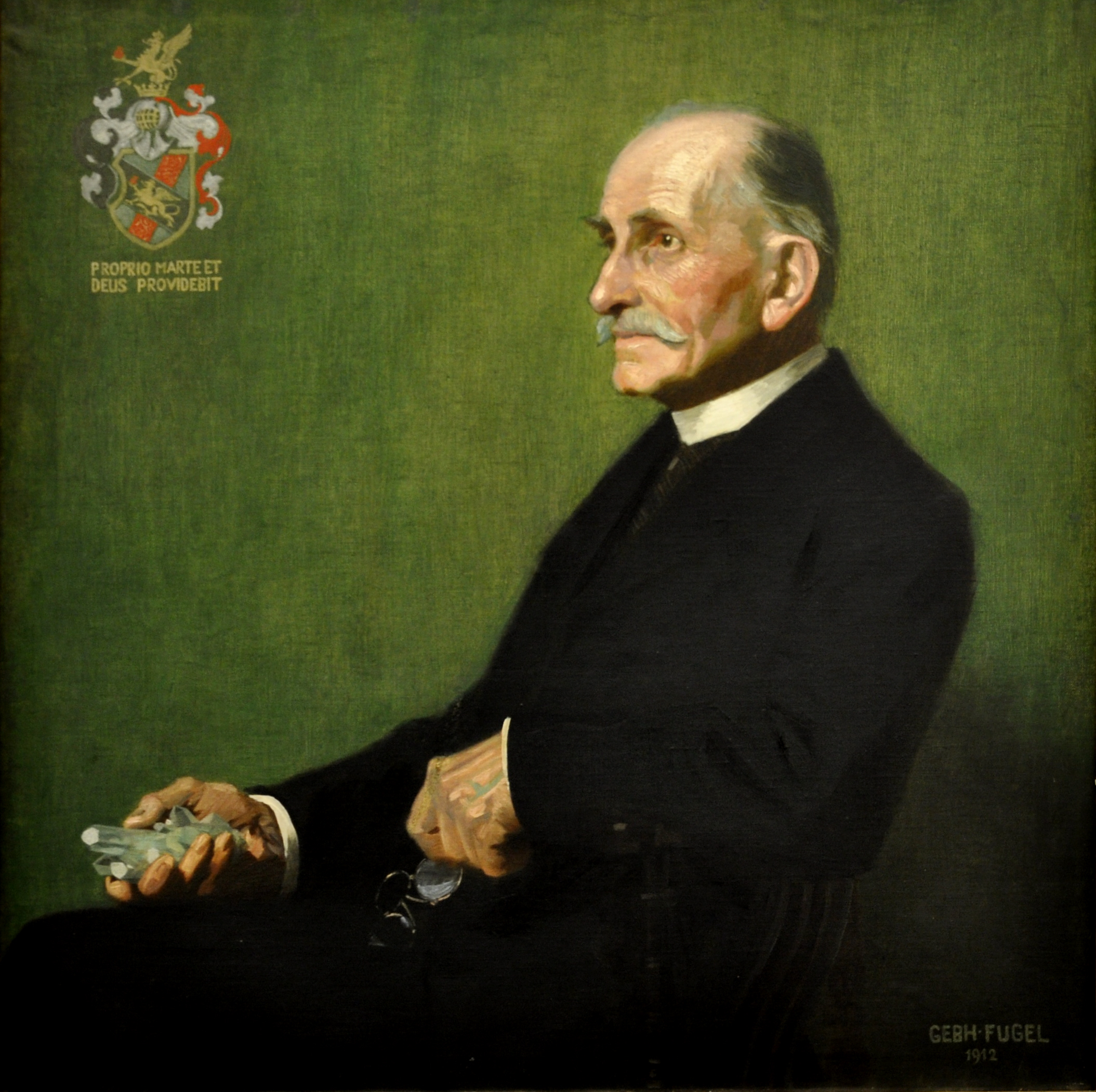 Porträt Friedrich Krauss, 1914; Privatbesitz VIAF: 171777315 GND: 1012794741